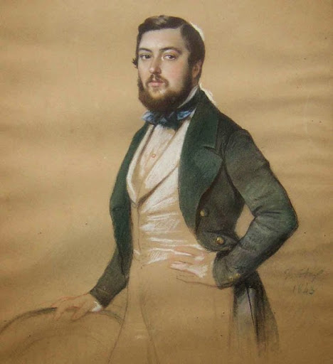 Thédore Mozin, par Antoine Etex.